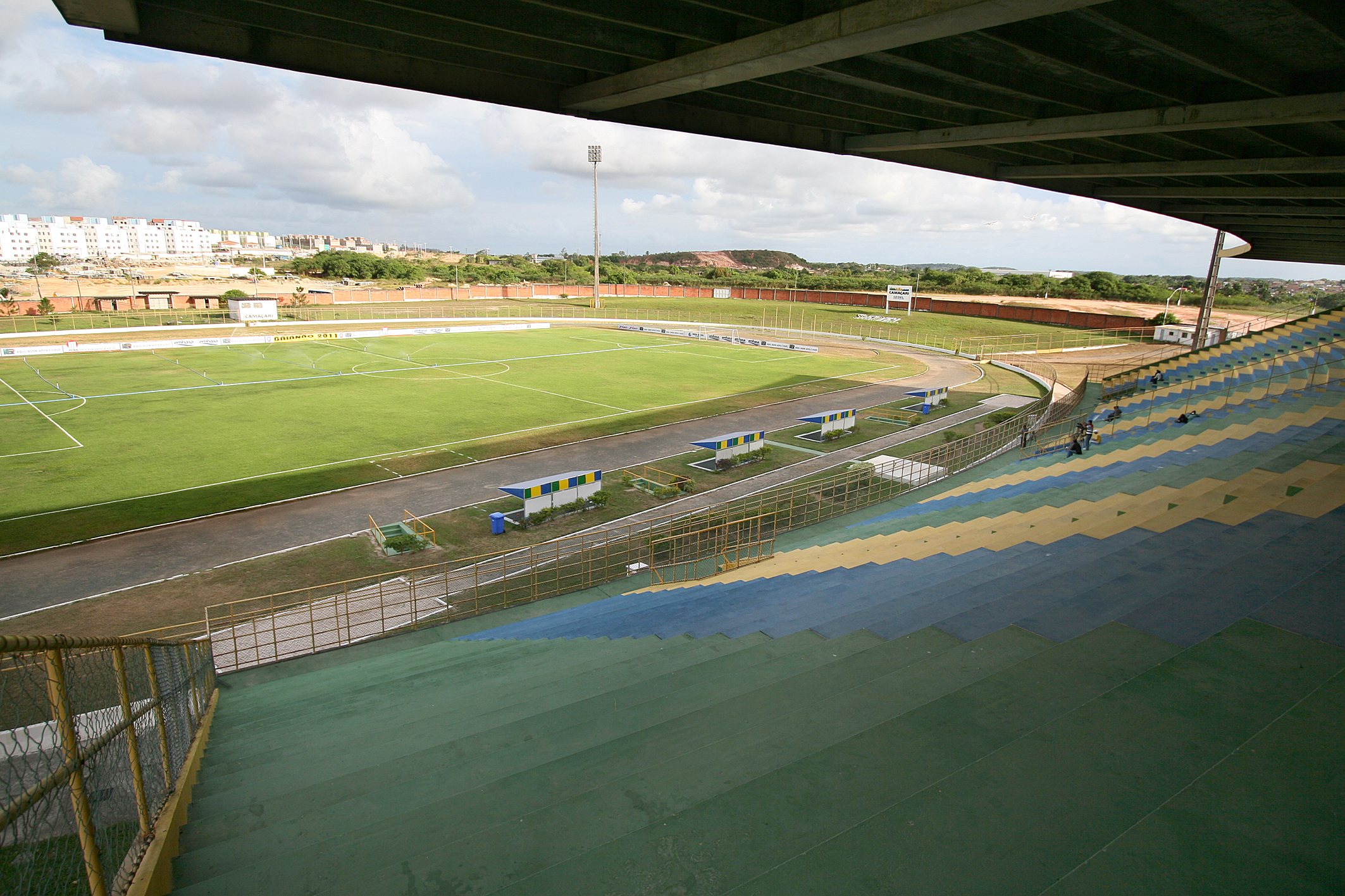 Comitê Organizador Local da Copa do Mundo 2014 realiza vistoria em estádios baianos Na foto: Estádio Armando Oliveira, Camaçari. Foto: Ronaldo Silva/AGECOM